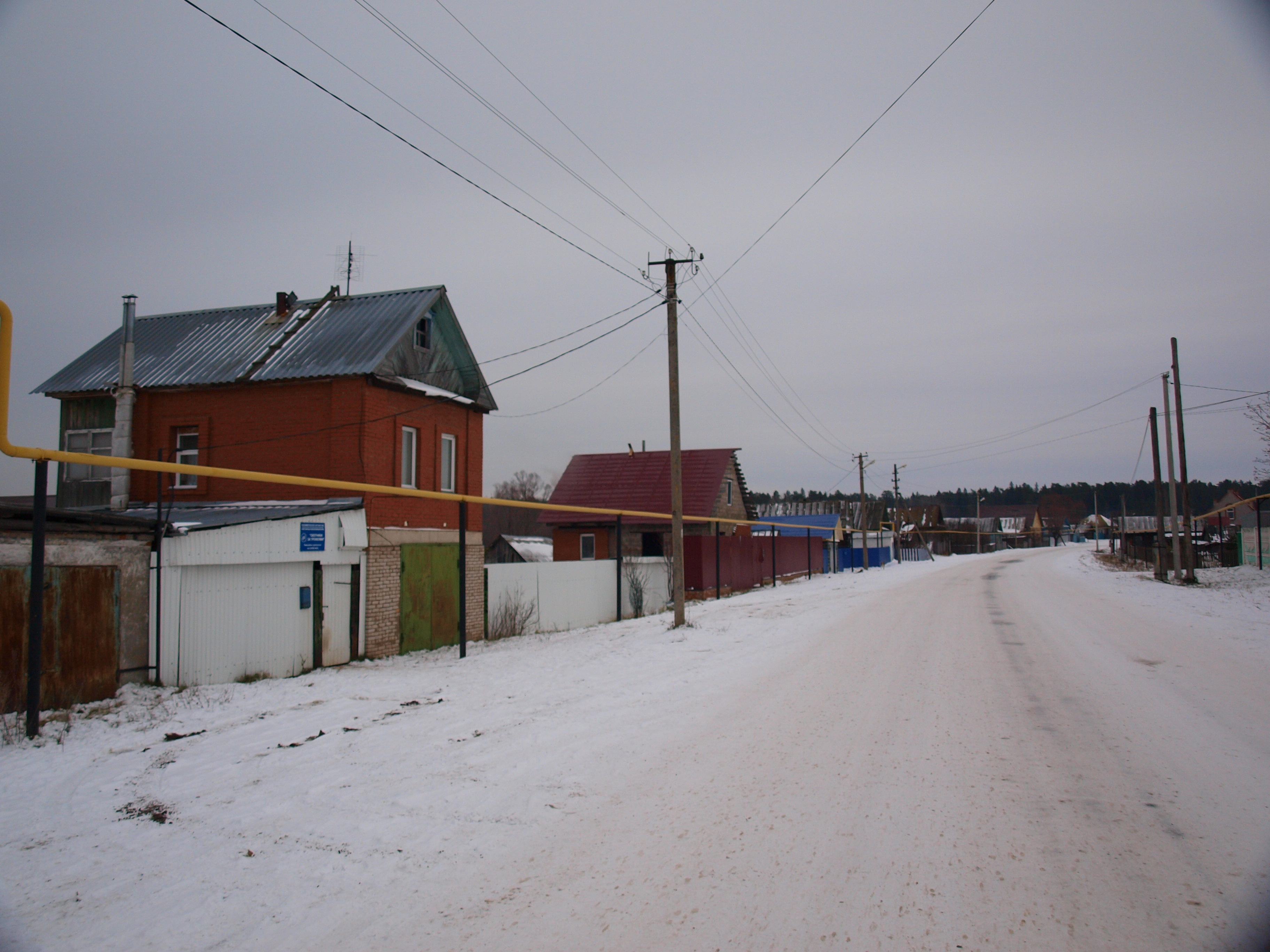 Деревня Саклово. Башкирия. РФ. Улица Дорожная. РФ.